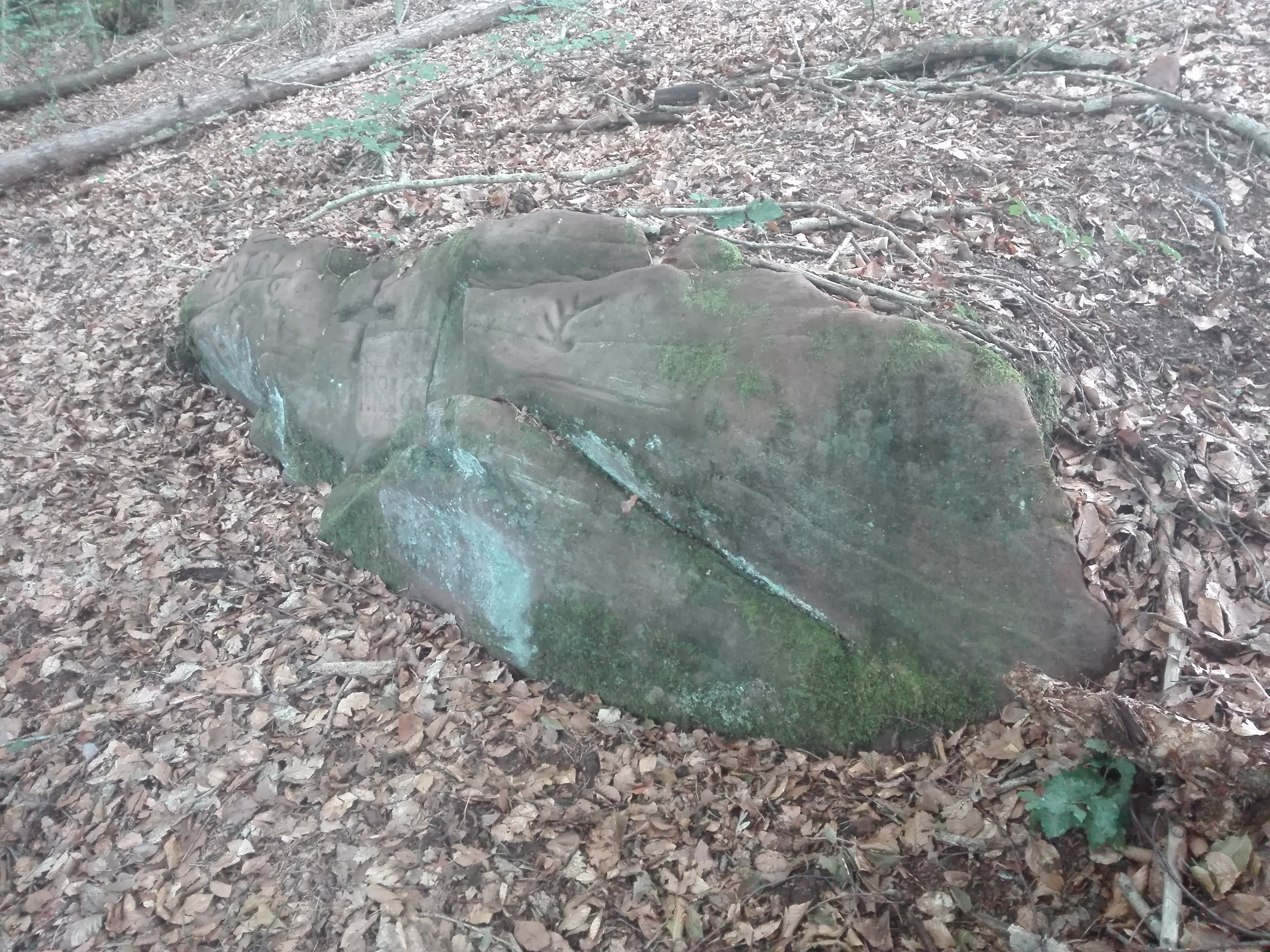 Loogfels Nr. 101 am oberen Ende des Dörrentals auf dem Teufelsfelsen bei Lambrecht. Bezeichnete ehedem die Grenze zwischen Deidesheim, Grävenhausen und Gimmeldingen.